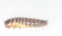 Speckkäfer (Dermestes lardarius), juvenil. Autor: Baccus, 4. 8. 2005